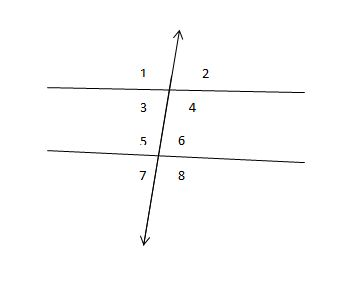 नेपाली: एकान्तर कोण(Alternative Angle)